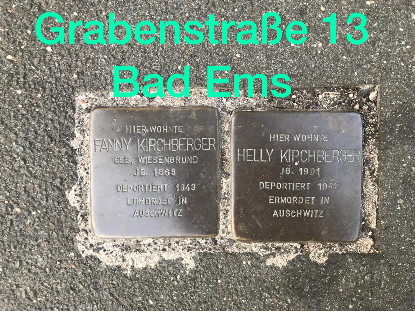 Grabenstraße13